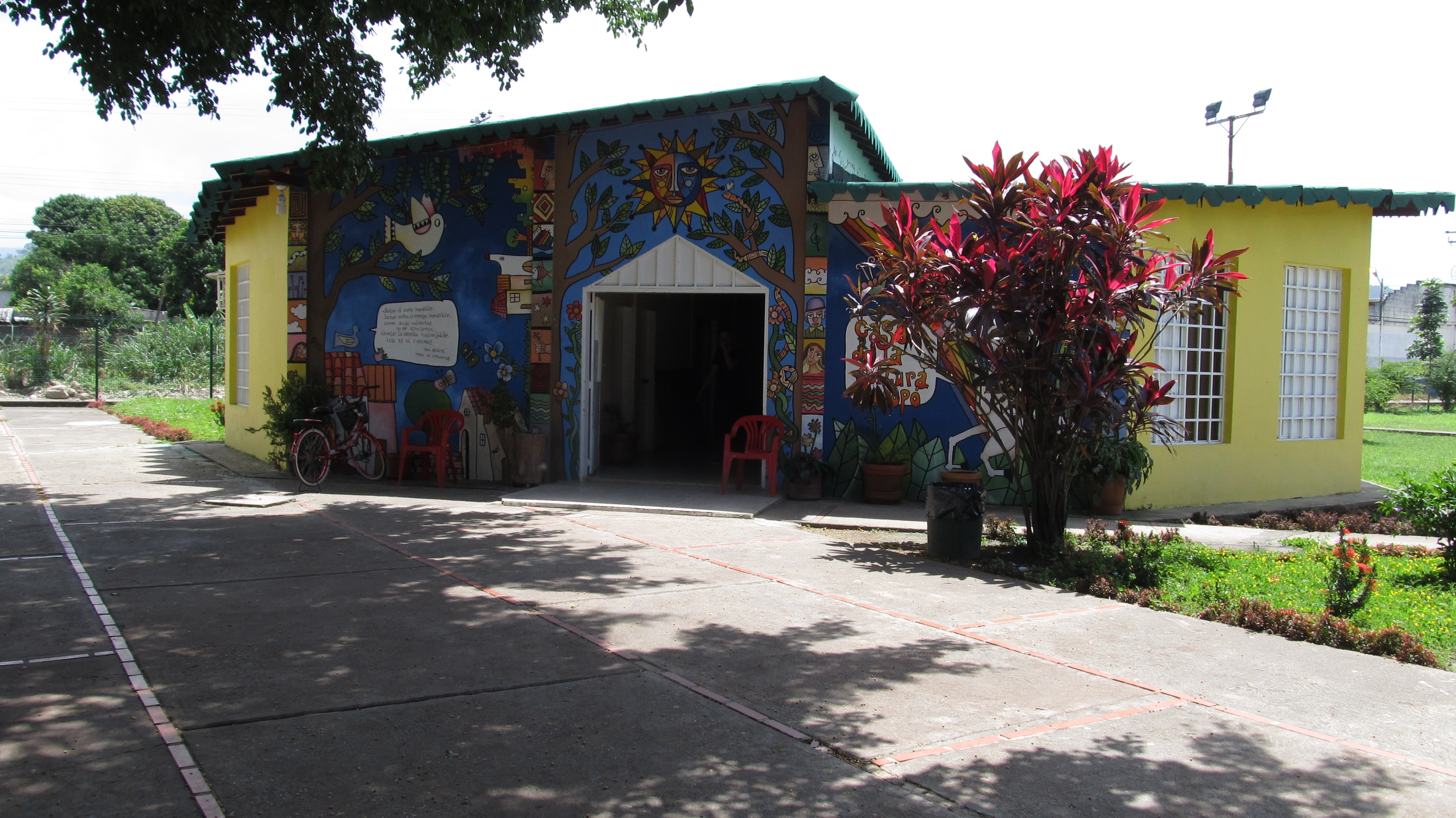 Foto tomada a la Casa de la Cultura ubicada en Socopó (estado Barinas), Venezuela